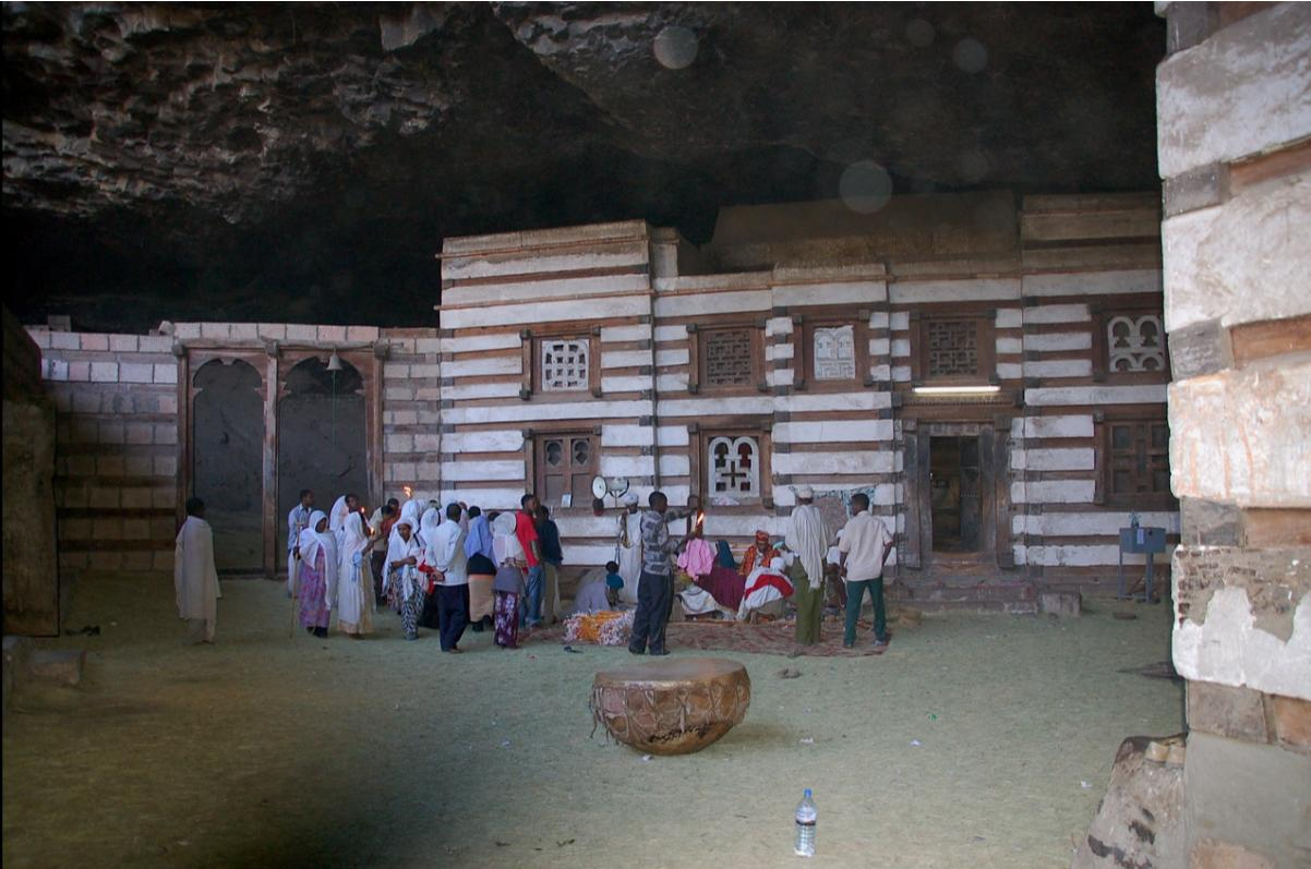 Eglise Yemhrehanna Krestos